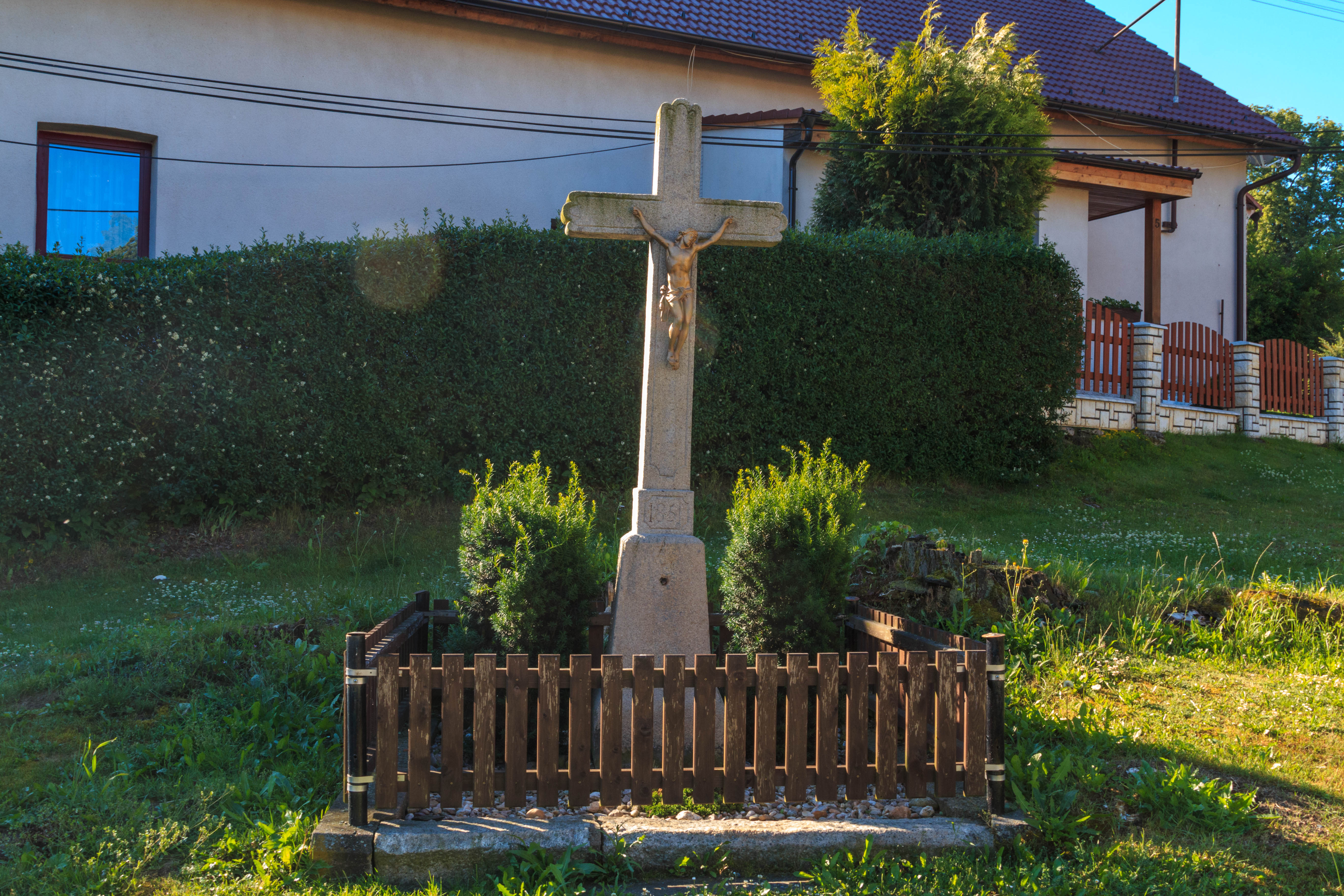 Nasavrky křížek